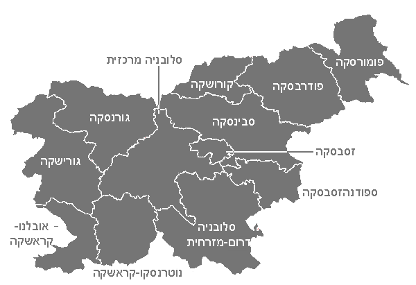 תרגום לעברית של מפת אזורי סלובניה.